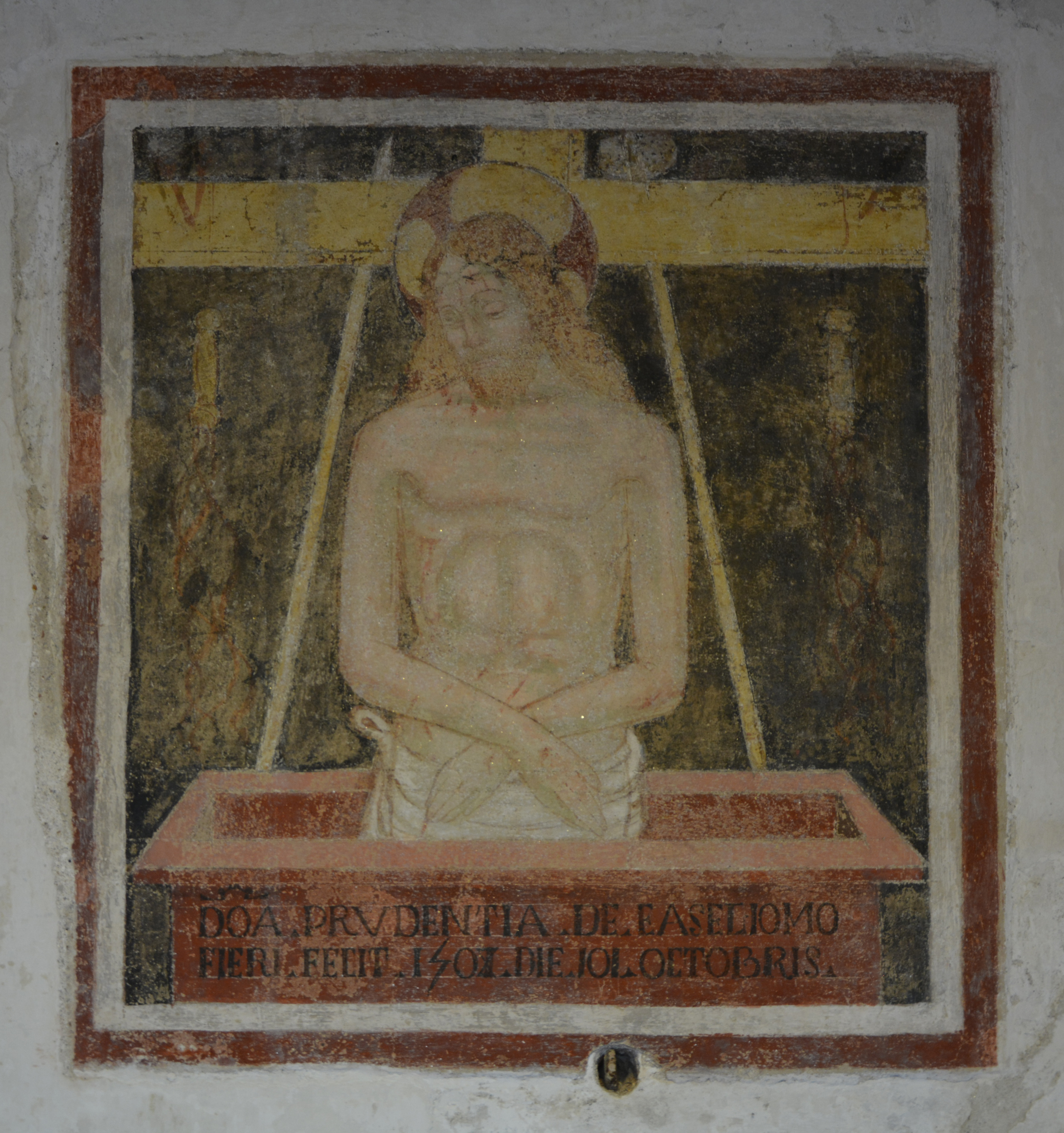 L'affresco "Christus Passus" nel monastero di Cairate, in provincia di Varese.